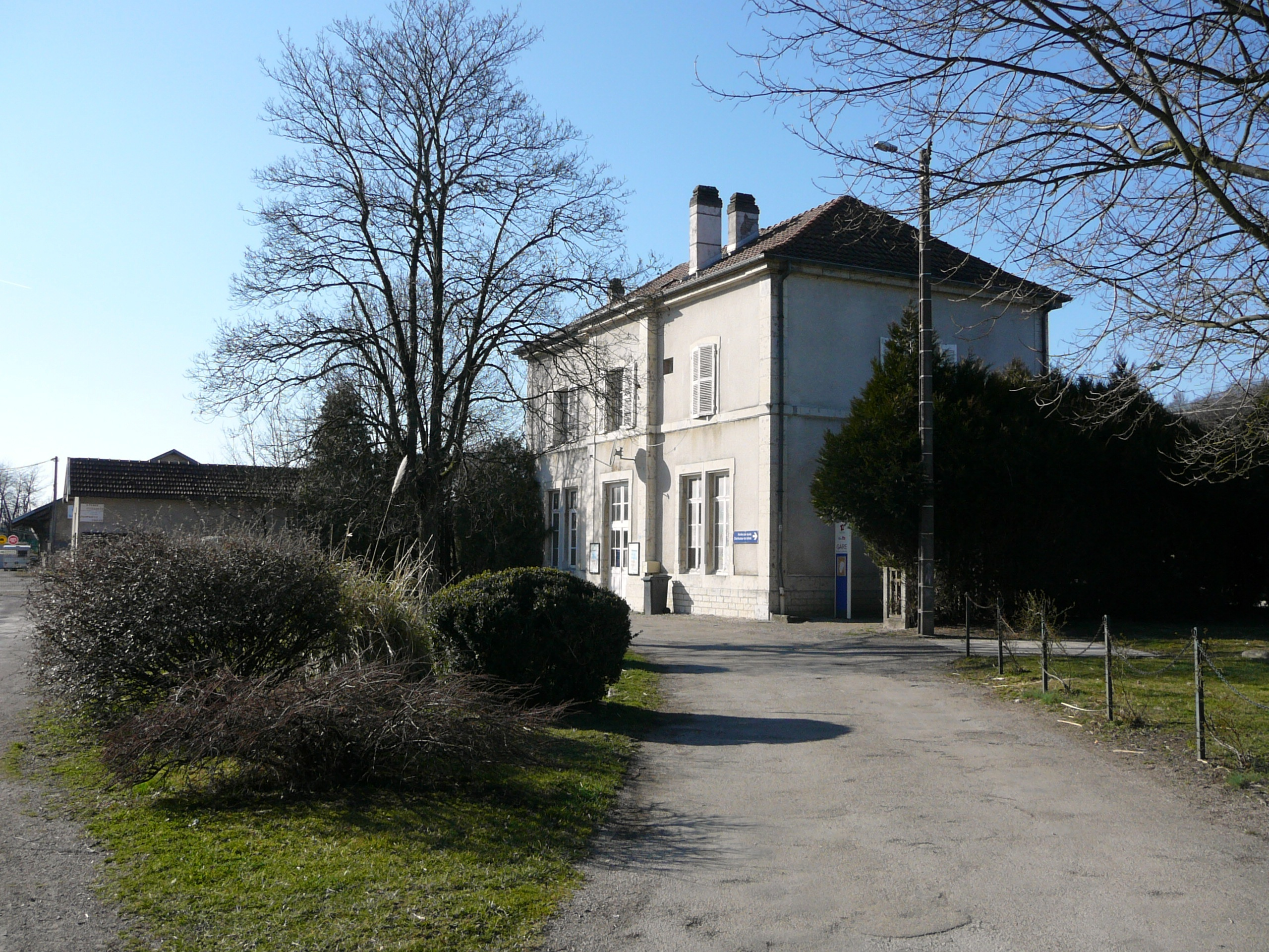 Gare de Roche-lez-Beaupré, vue de la cour de la gare